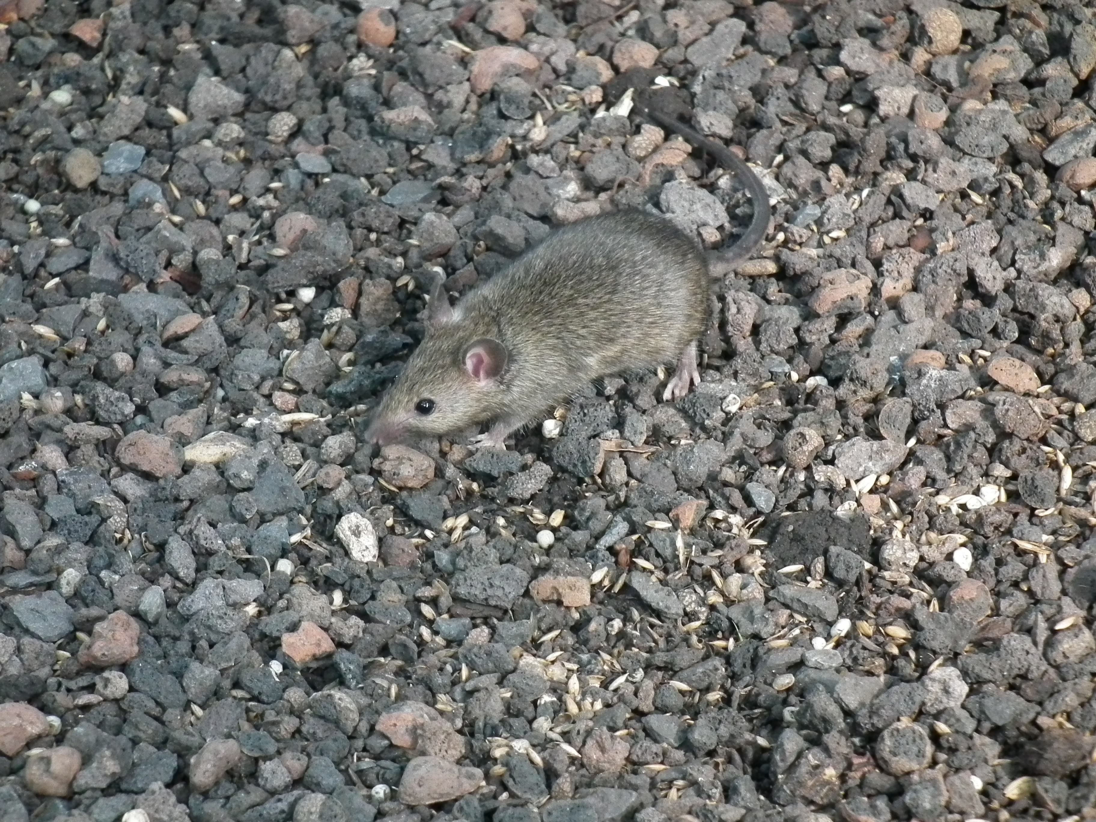 Hausmaus (Mus musculus), fotografiert im nördlichen Baden-Württemberg (Deutschland)